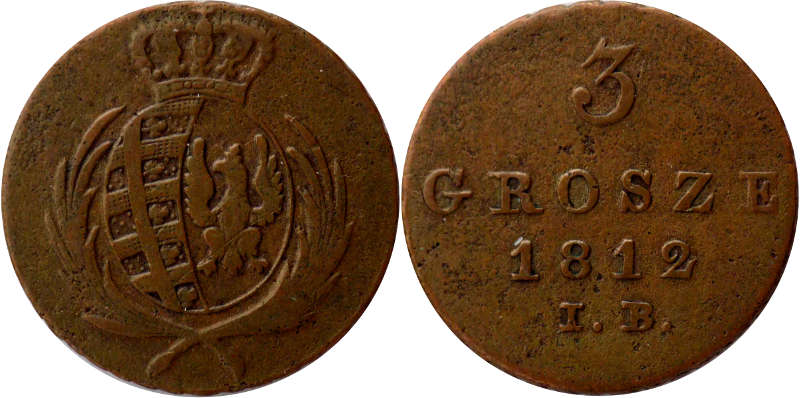 3 grosze 1812